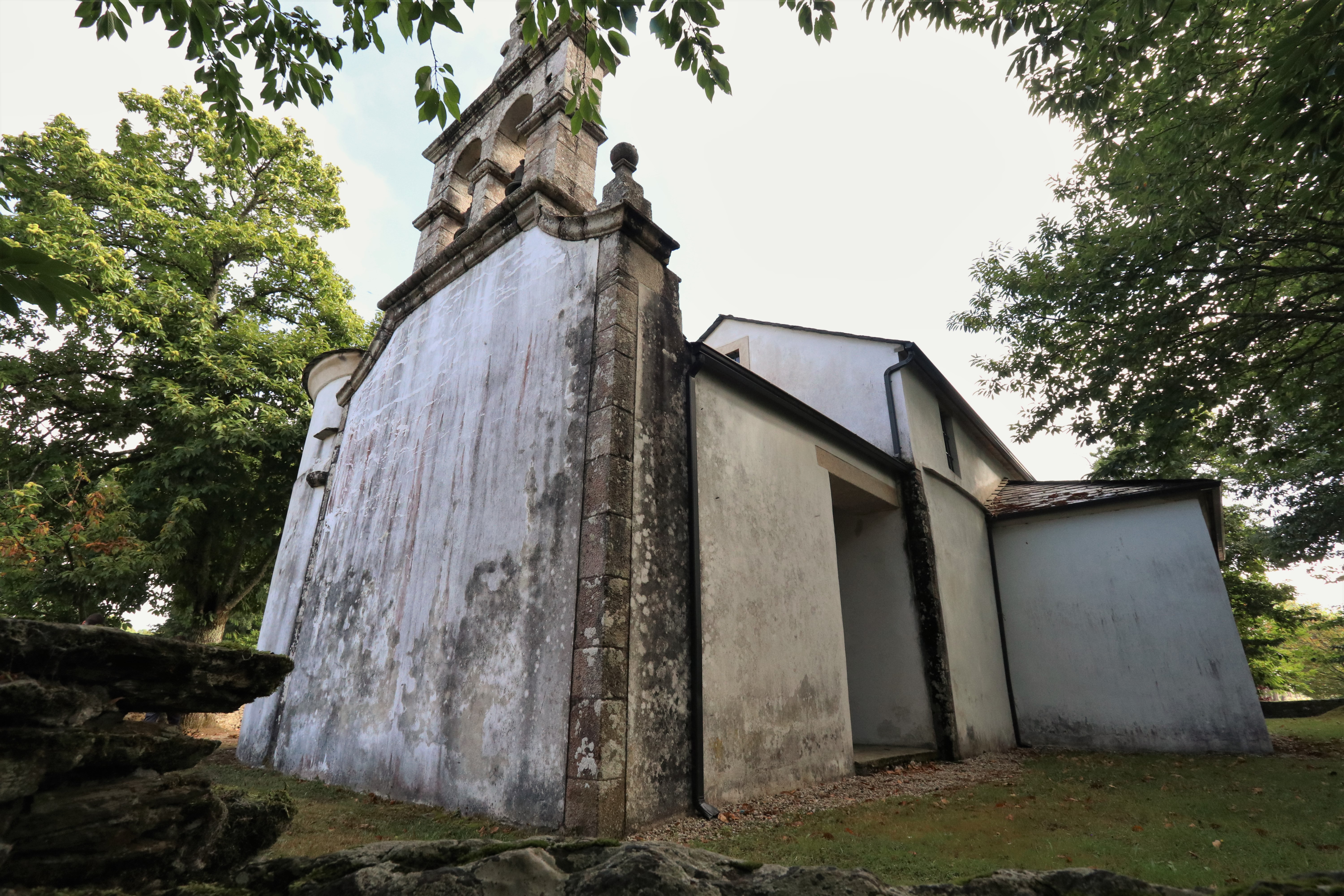 Igrexa de Moncelos, Abadín.